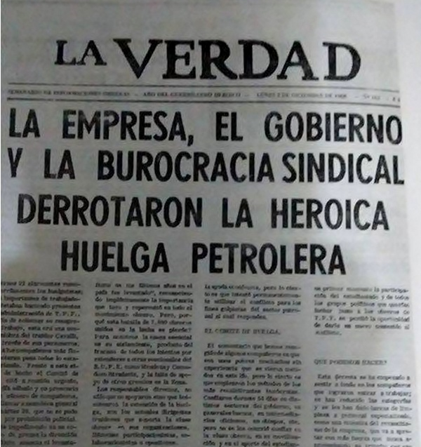 Diario de divulgacion publica